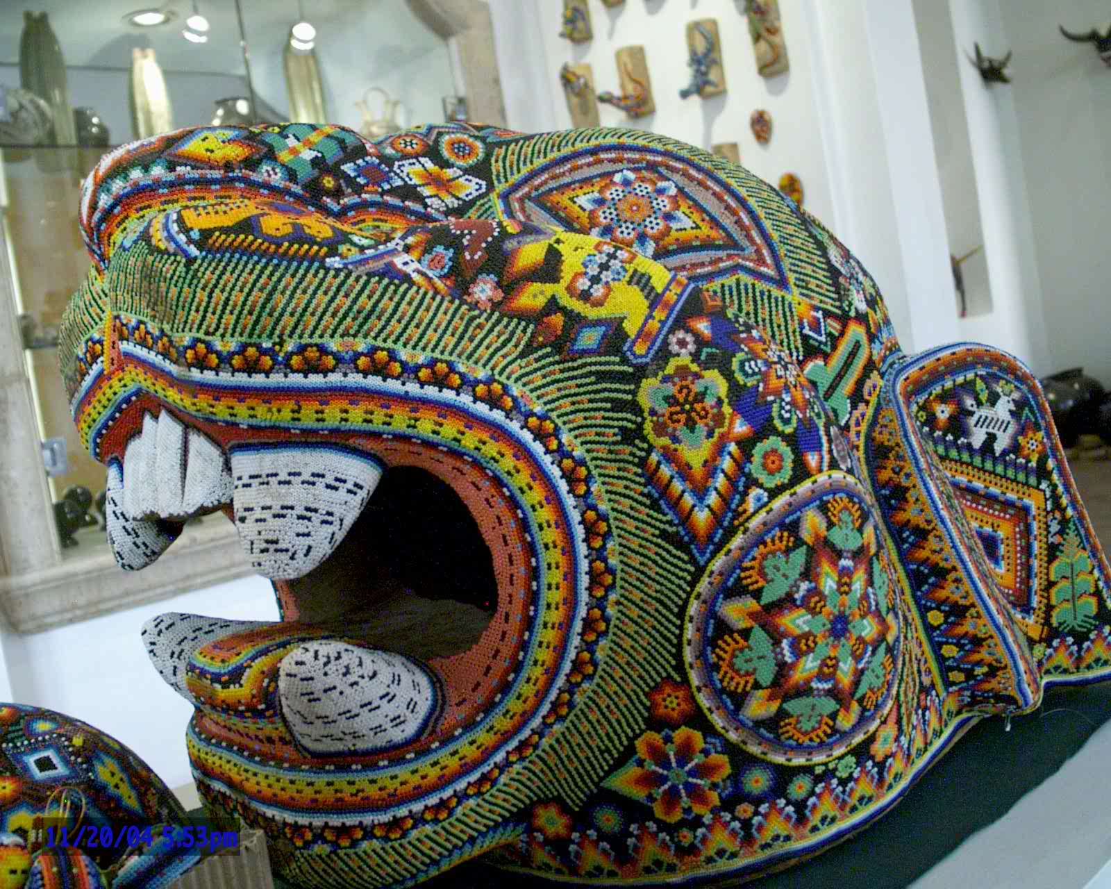 Huichol Trabajando, 20 Dic 2004 by Mario Jareda Beivide, Fotografias de Mexico